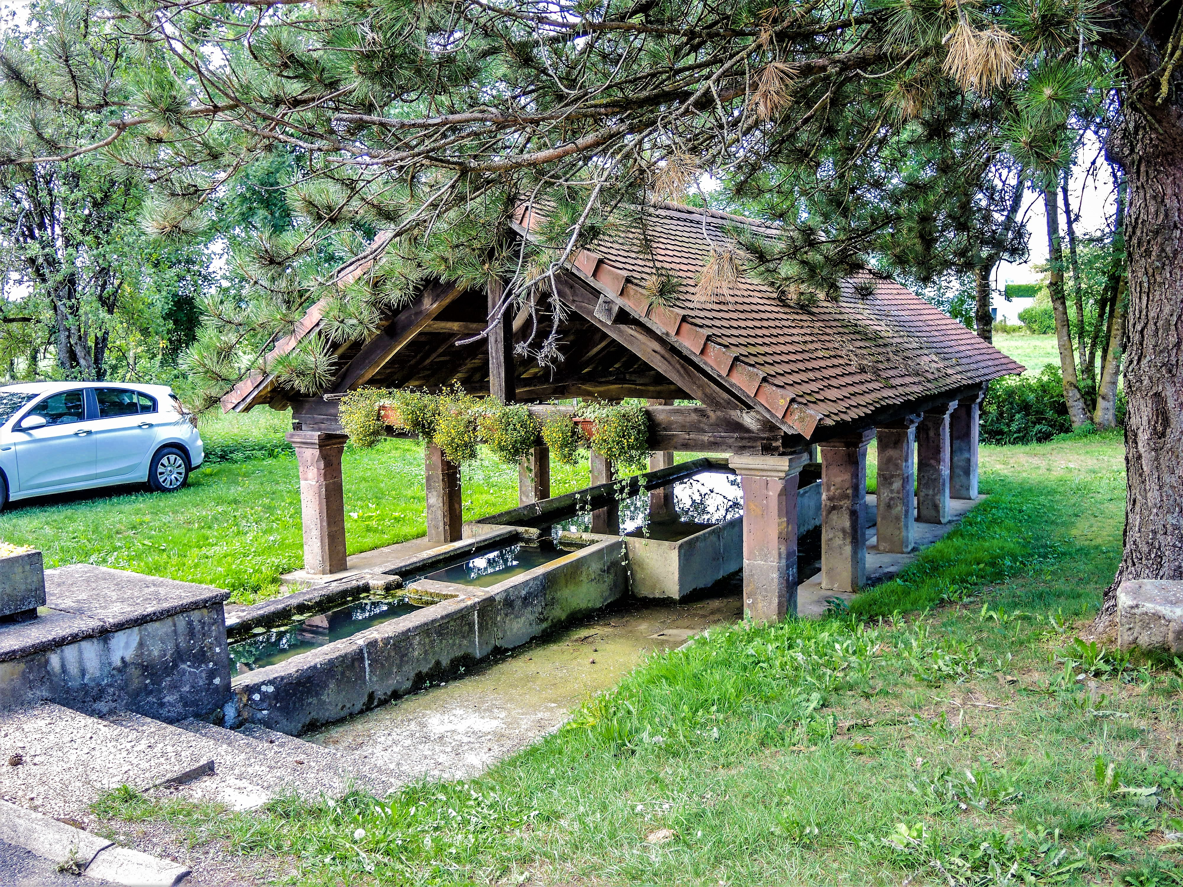 Fontaine-lavoir